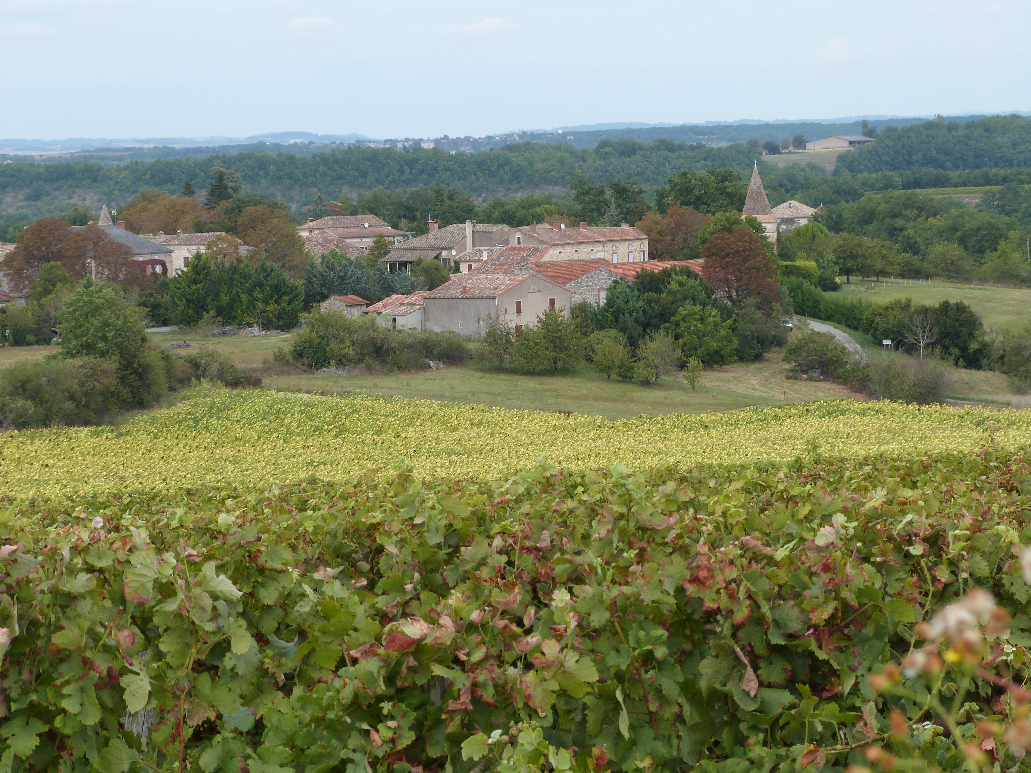 Vue du village depuis la D33